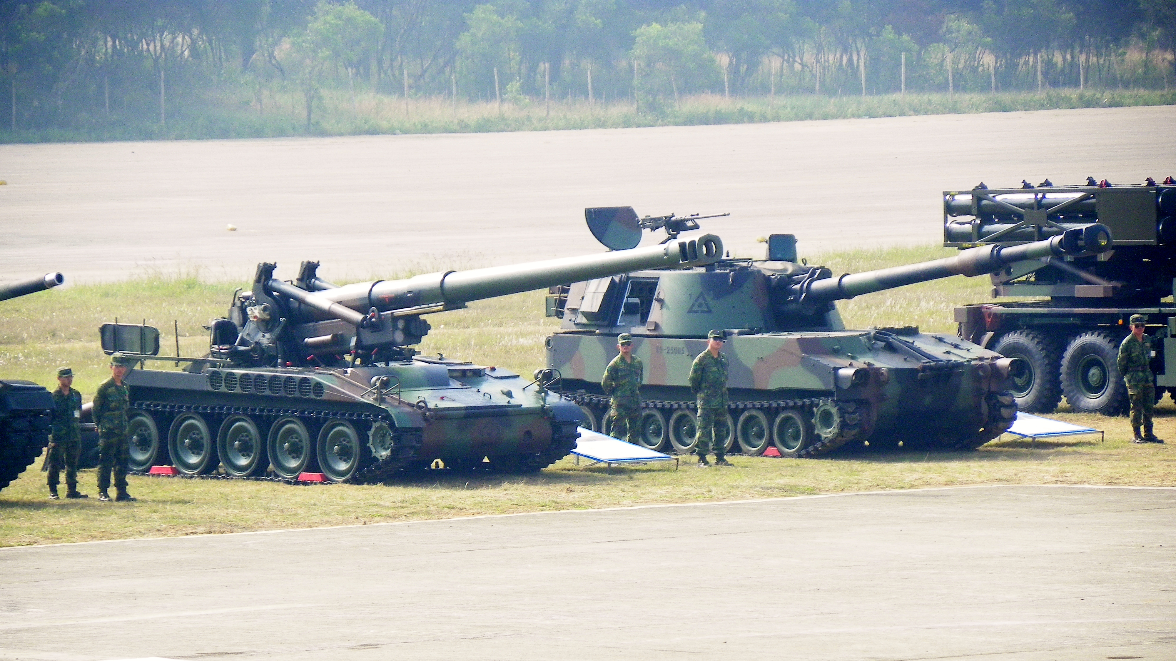 陸軍湖口營區開放活動表演節目中，中興臺大校場後方的M110A3與M109A3自走榴彈砲，右端是雷霆2000多管火箭系統。